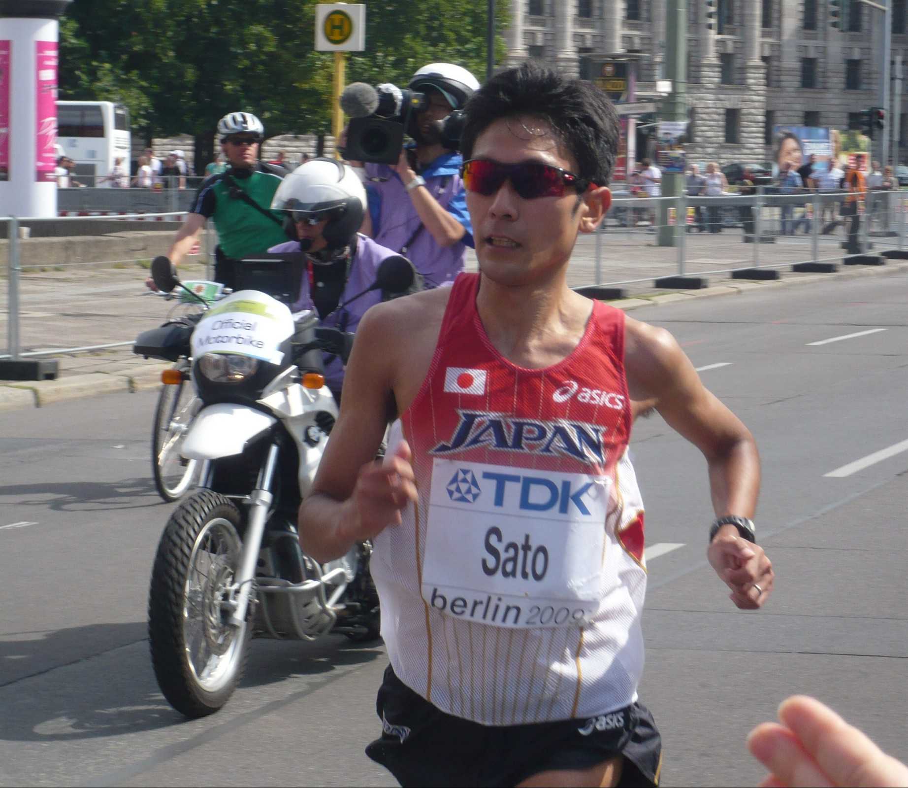 Leichtathletik Weltmeisterschaft, Berlin 2009, Marathon der Herren, der Japaner Atsushi Satō am Kilometer 40, am Ende mit 2:12:05 Platz 6.